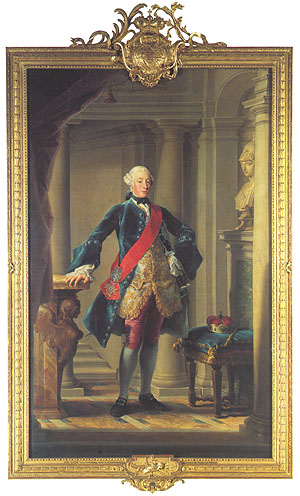 „Herzog Carl Eugen von Württemberg“, Gemälde von Pompeo Batoni, 1753, Württembergische Landesbibliothek, Stuttgart. Landesarchiv Baden-Württemberg.